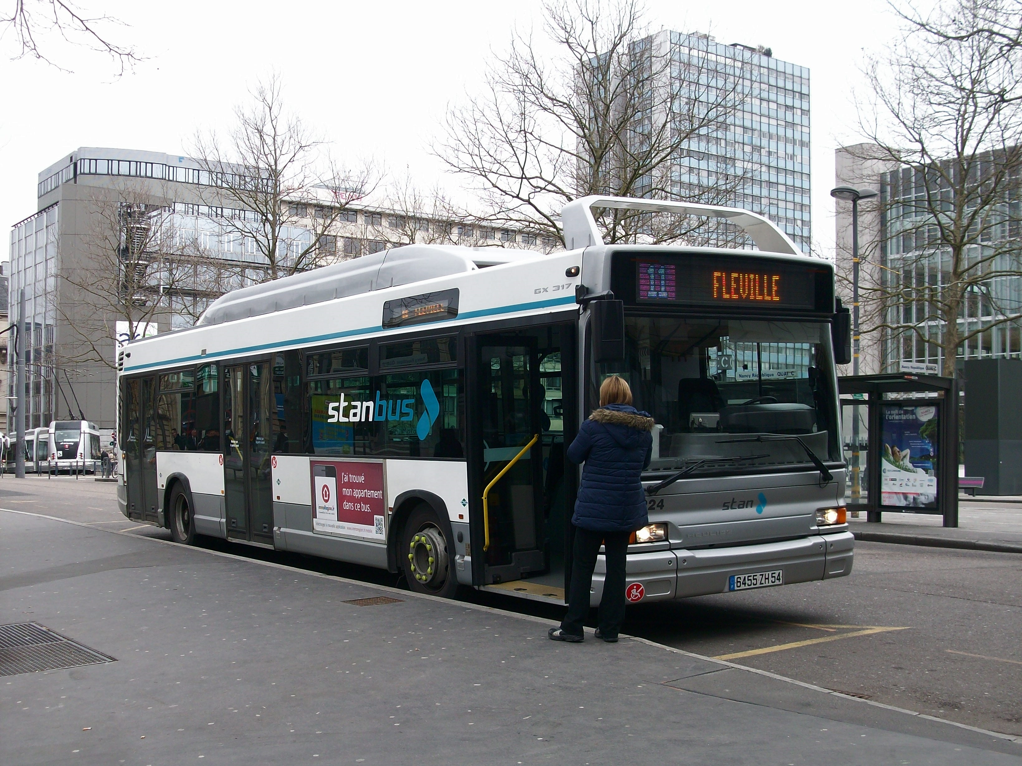 Heuliez GX 317 GNV n°224 ligne 11, en attente à la Gare de Nancy